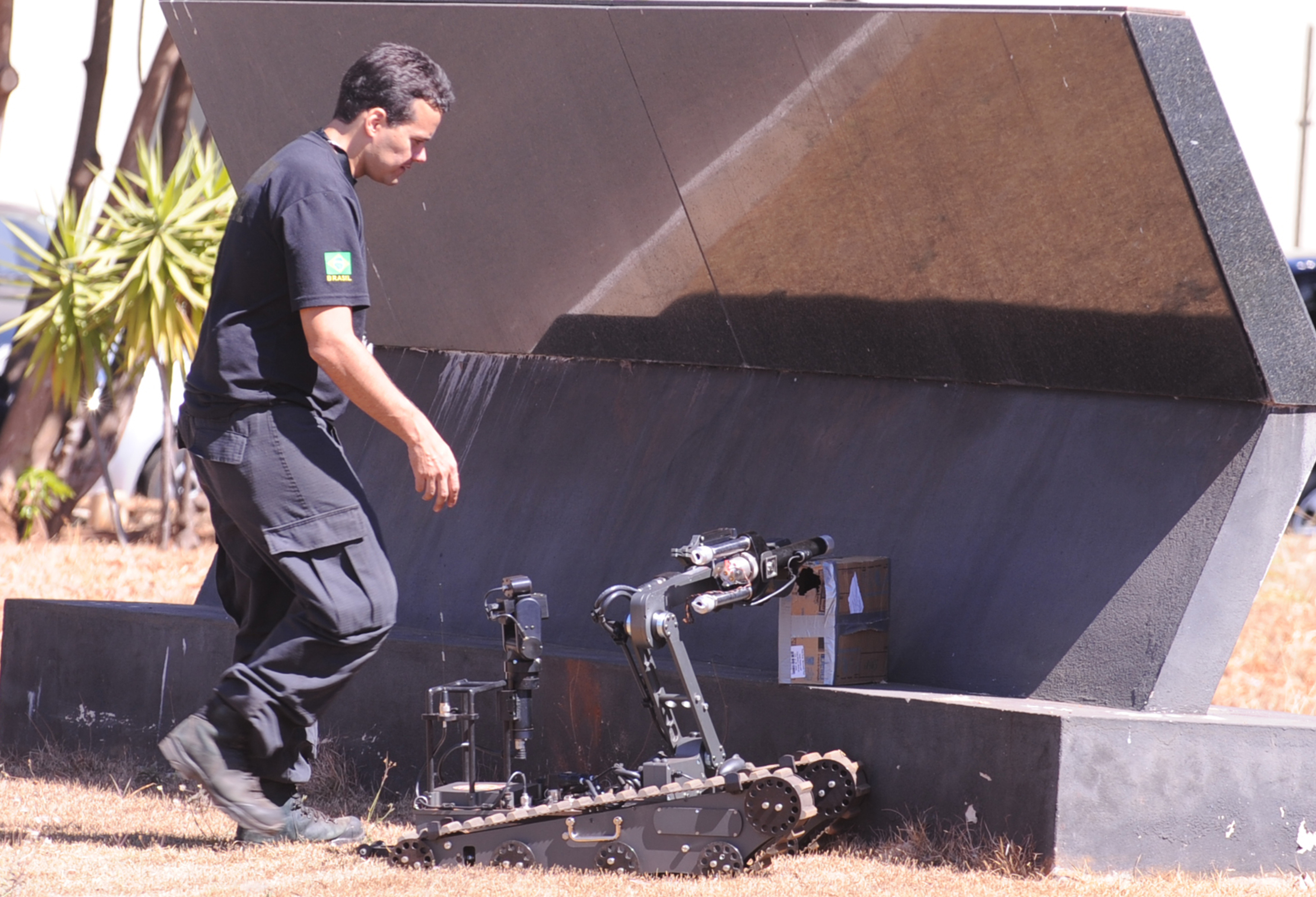 Brasilia - A Polícia Federal apresenta os equipamentos do seu Grupo de Bombas e Explosivos. O aparato será utilizado no esquema de segurança da Copa do Mundo de 2014 e nos Jogos Olímpicos de 2016, no Rio de Janeiro.